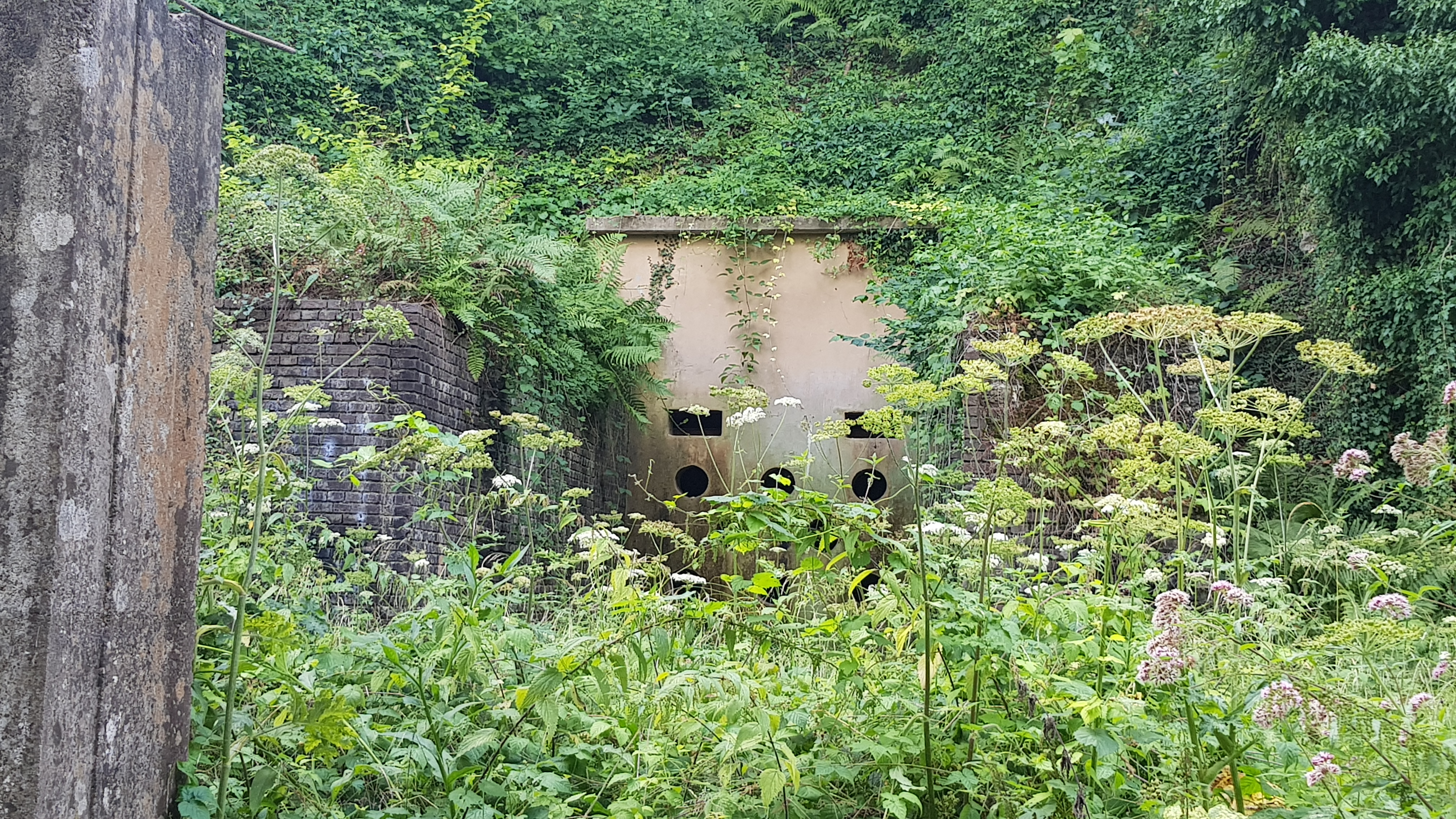 Kleine Bonsdalgroeve, Bronsdaelgroeve, Geulhem, Nederland